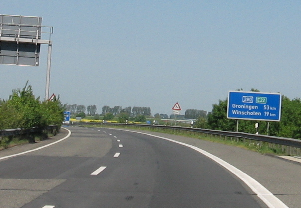 Bundesautobahn 280